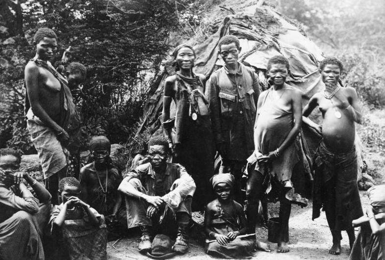 Hottentottenfamilie in Namaland